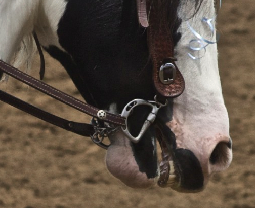 Gypsy Vanner Horse, detail of muzzle